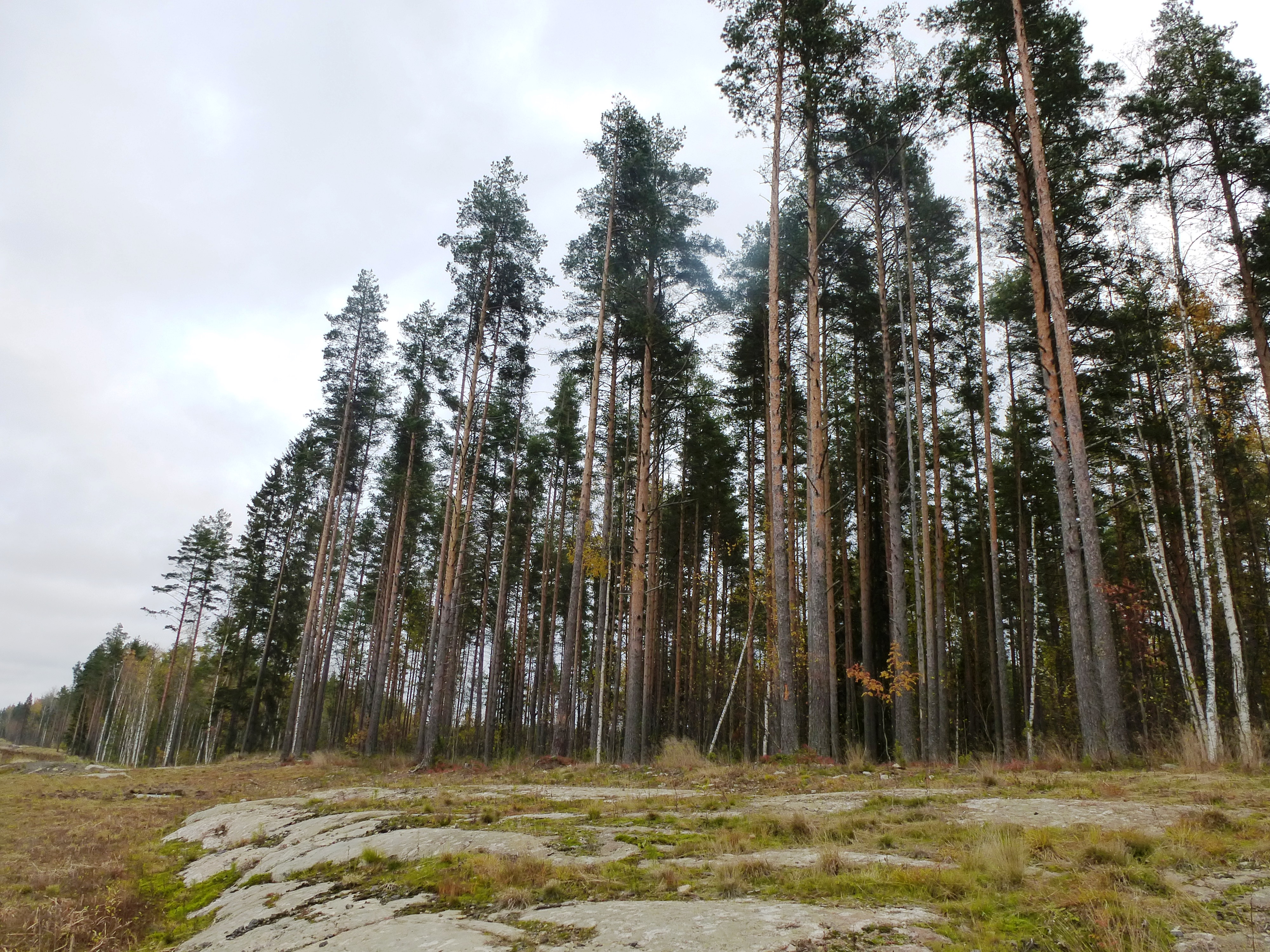 Лесной массив в Кондопожском районе Республики Карелия